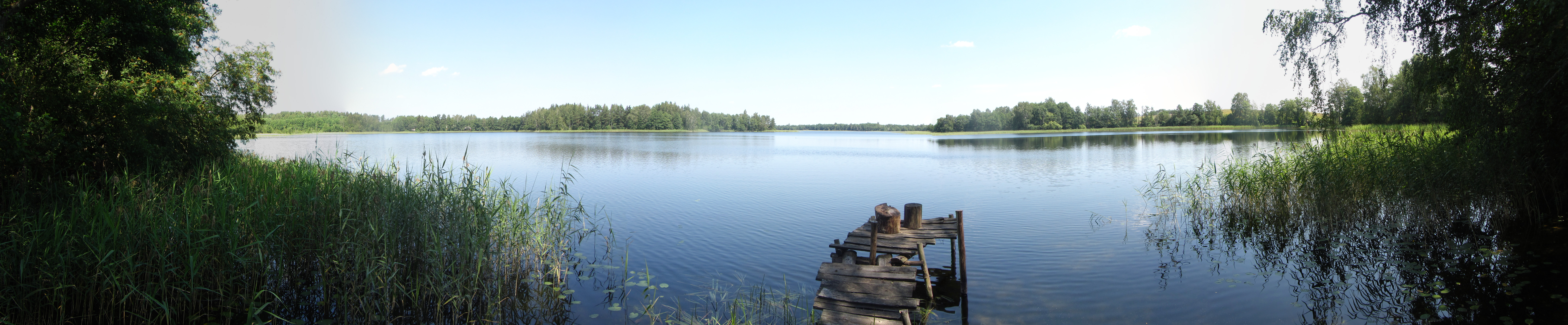 Rimšės sen., Lithuania